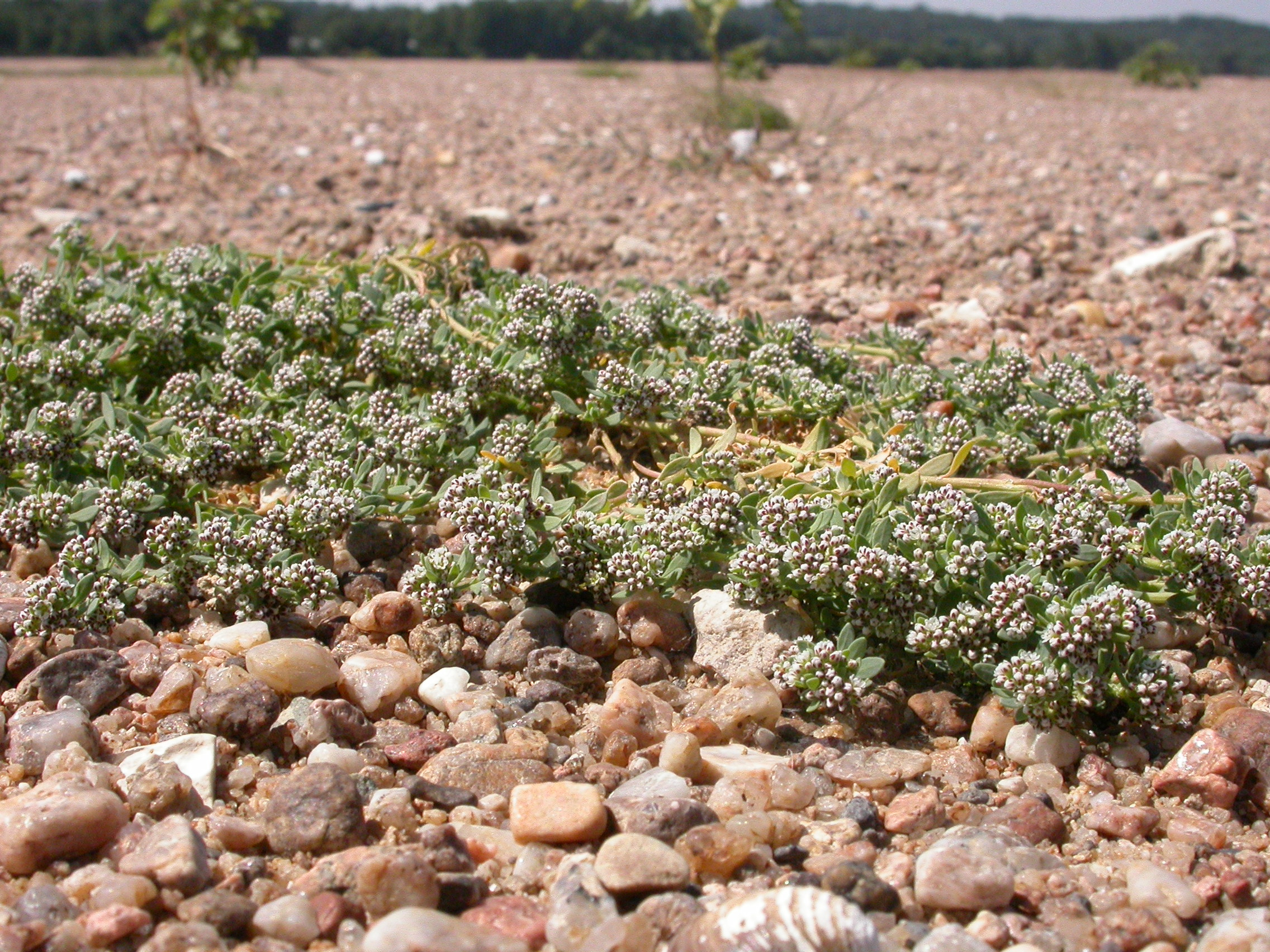 Corrigiola litoralis Saint-Mathurin-sur-Loire ( Maine-et-Loire), France